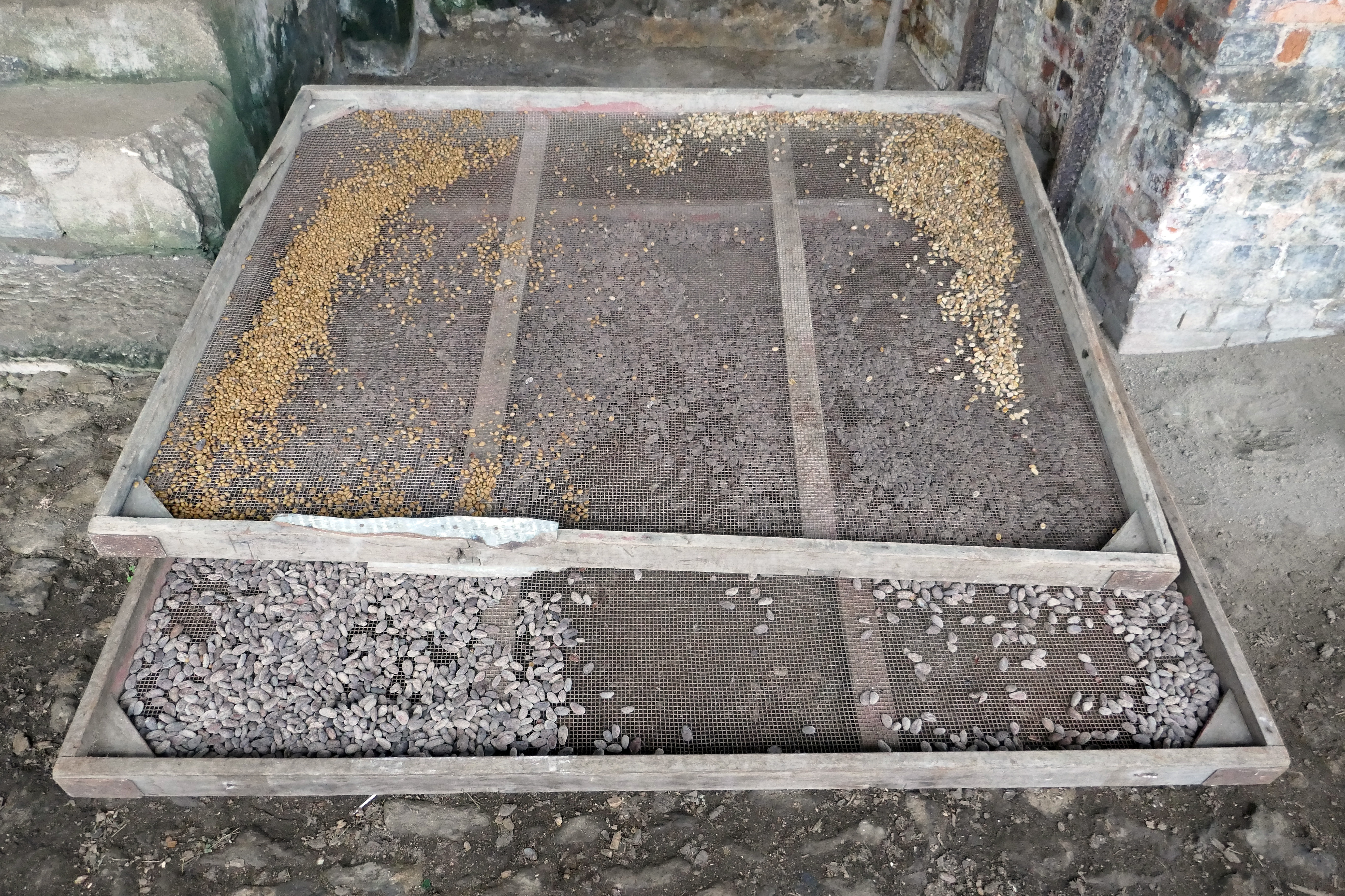 Grains de café et fèves de cacao grillés à Monte Café, au nord de l'île de São Tomé, dans le district de Mé-Zóchi (São Tomé-et-Principe).